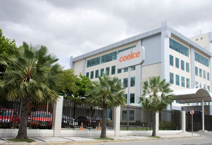 Prédio Sede da Coelce - Fortaleza, Ceará